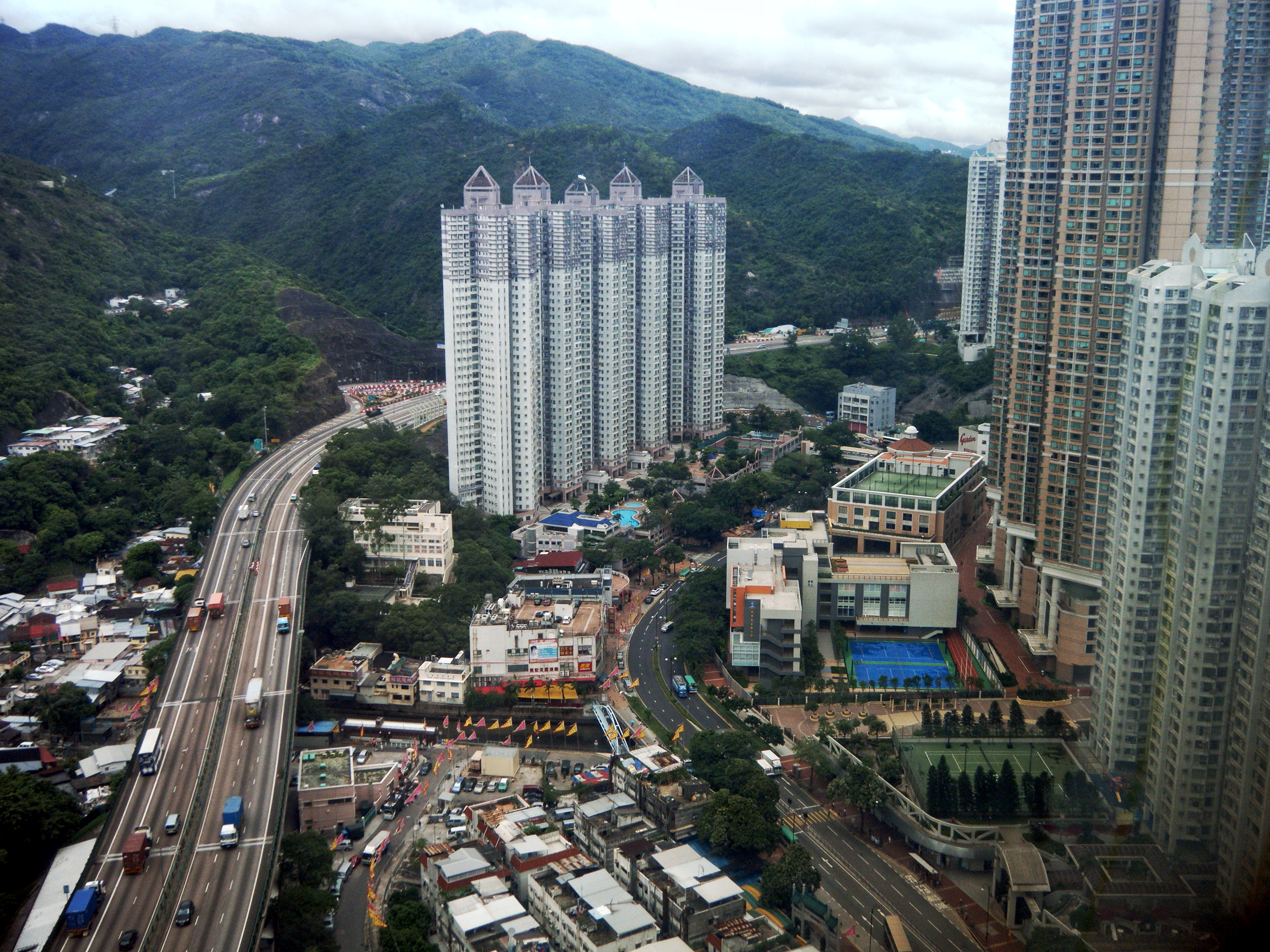 中文（香港）: 深井街景